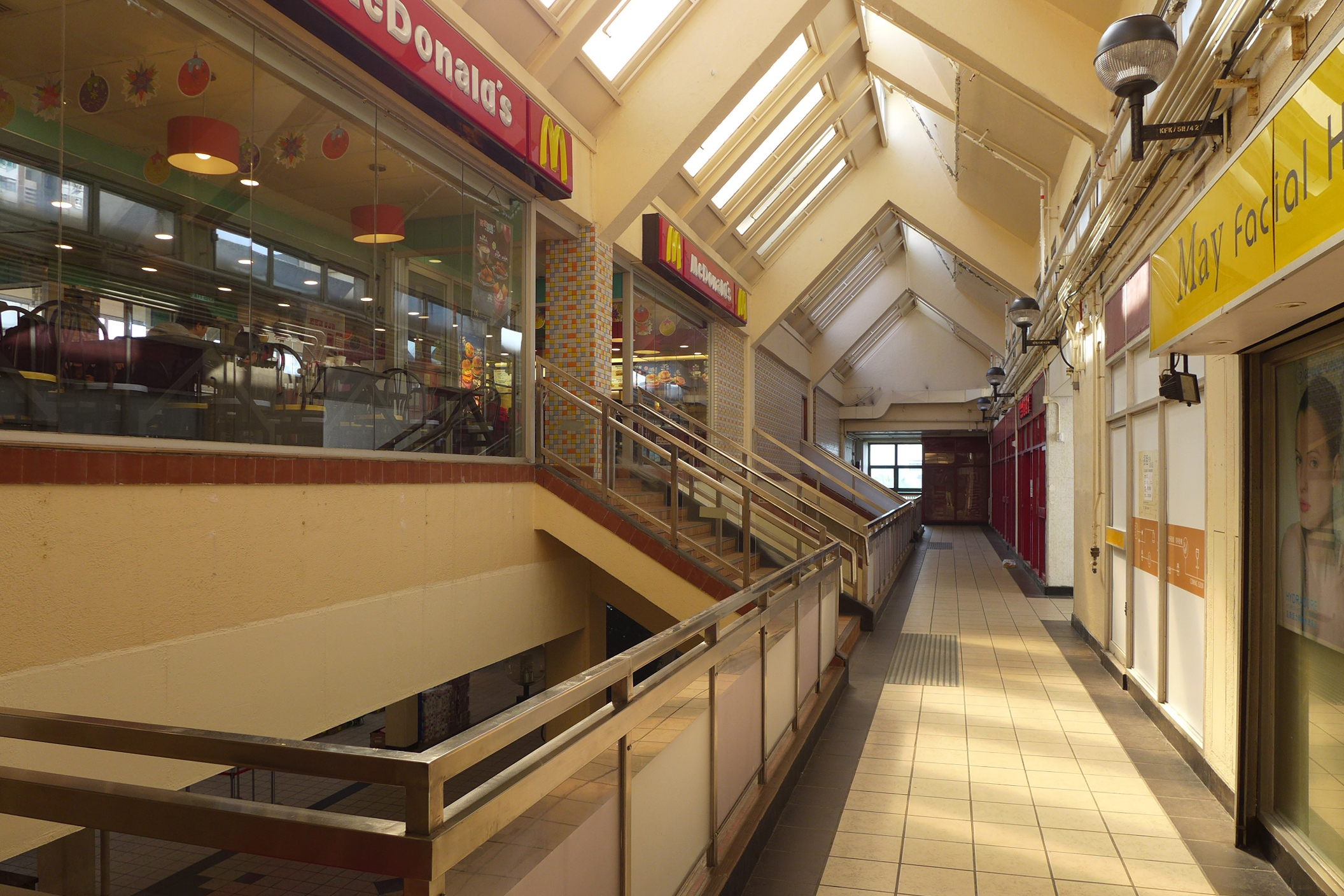 Kwong Fok Shopping Centre